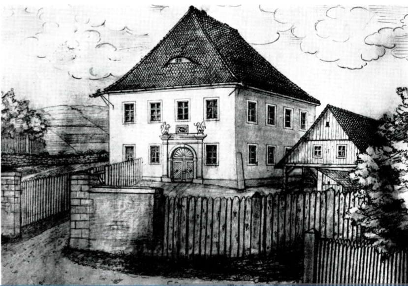 Zeichnung des Pflegeschlosses Bärnau von L. Zandt von 1o912